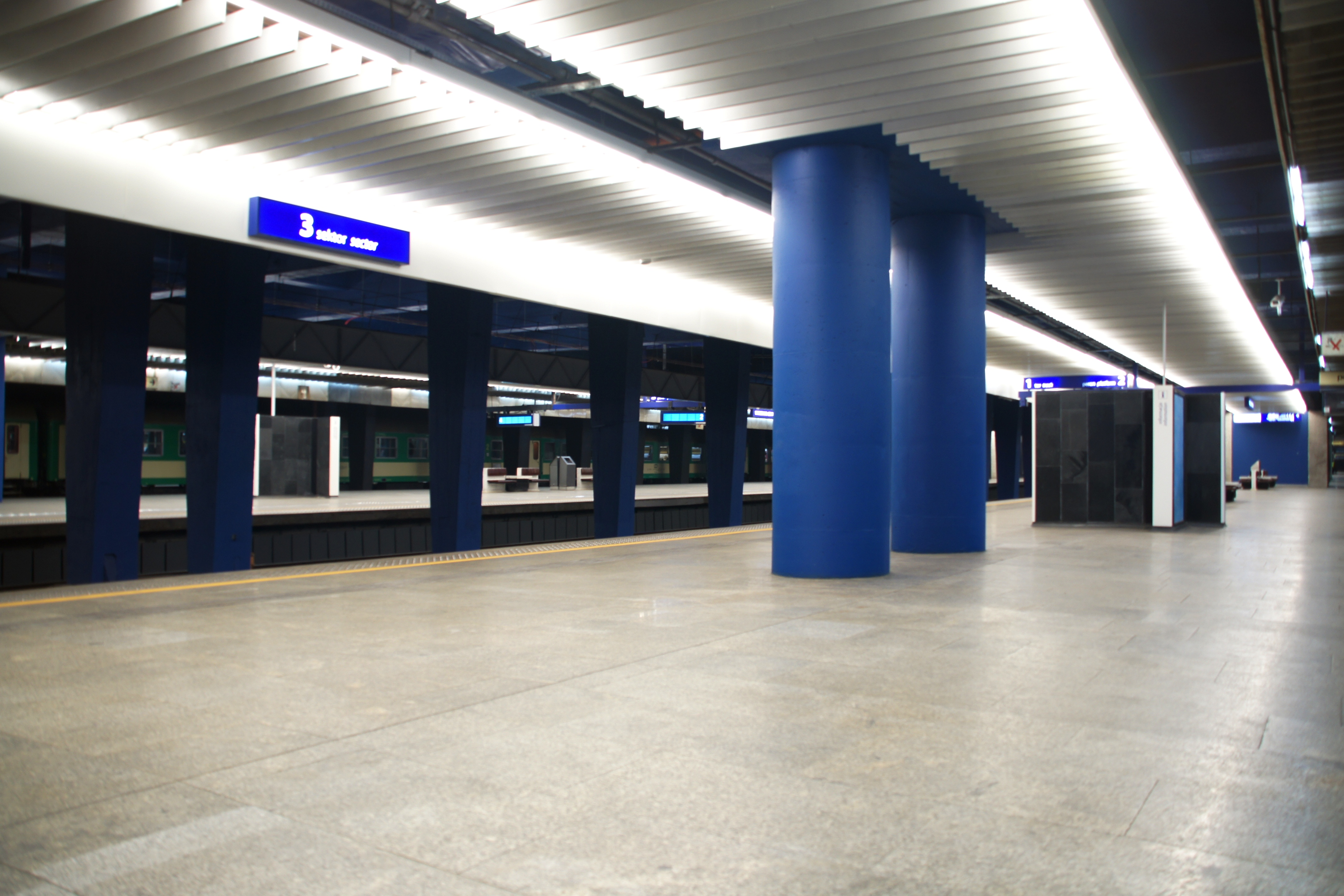 peron na dworcu Warszawa Centralna